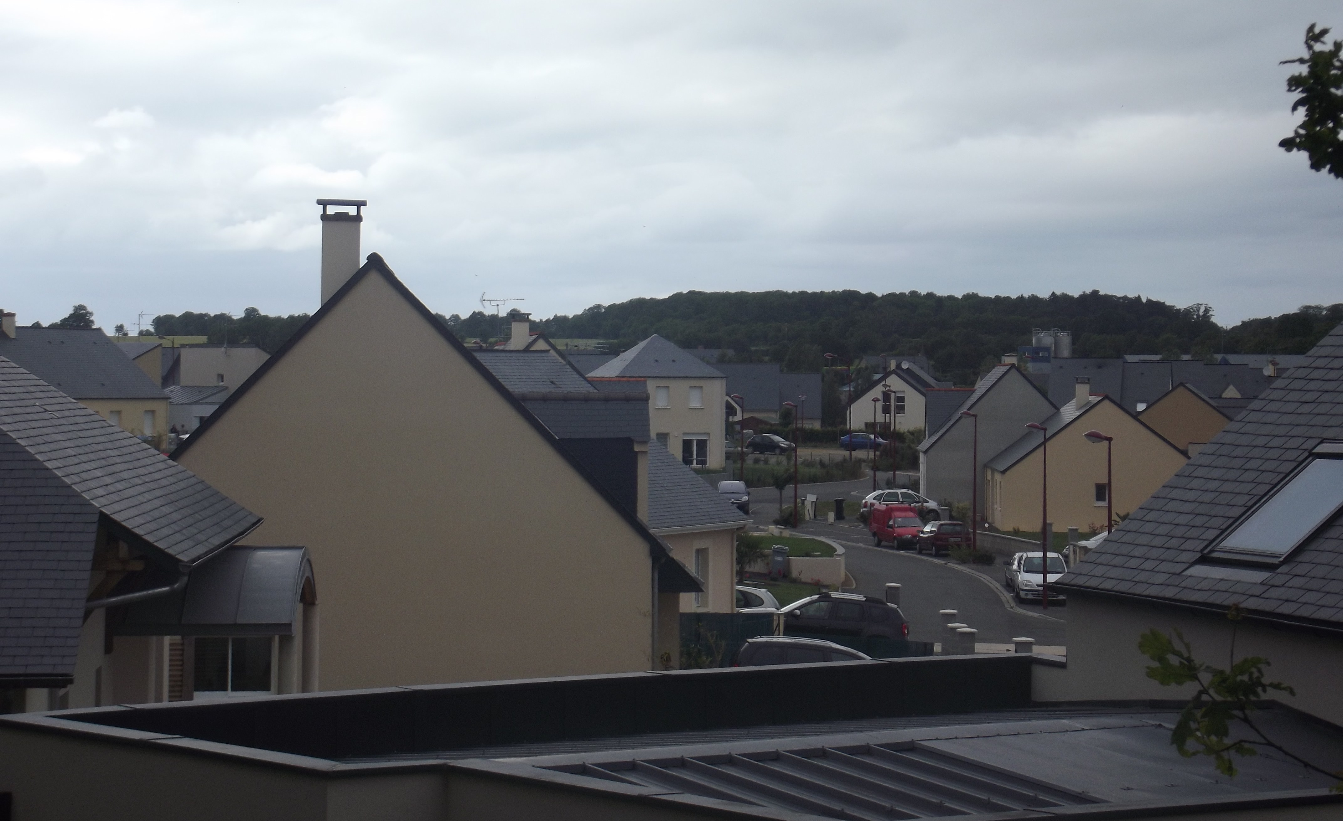 La ZAC du Domaine des Chênes I à La Membrolle-sur-Longuenée (Maine-et-Loire)